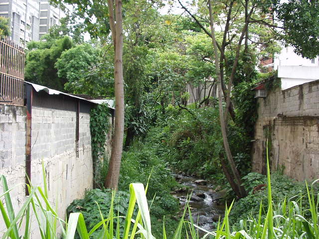 Quebrada Sebucán Caracas - Venezuela Nota: Tome la imagen de esta fuente Venciclopedia: Quebrada de Sebucan.jpg se señala lo siguiente: Esta imagen ha sido liberada al dominio público por su autor. Esto aplica en todo el mundo, pero en algunos países esto no es posible, si ese es el caso: el autor concede a cualquier persona el derecho de usar este trabajo para cualquier propósito, sin condiciones, a menos que dichas condiciones sean requeridas por la ley.